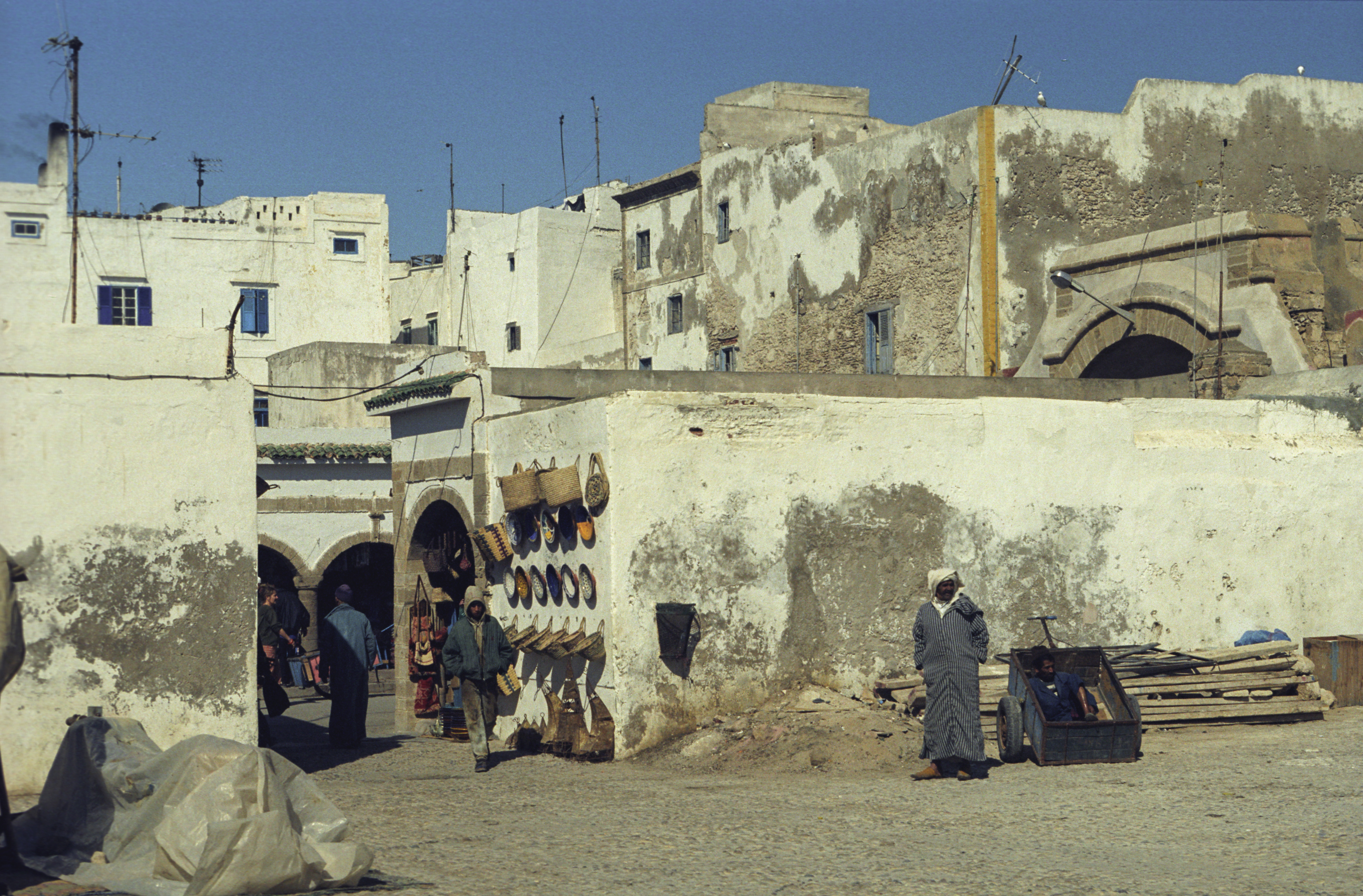 Essaouira. Medina